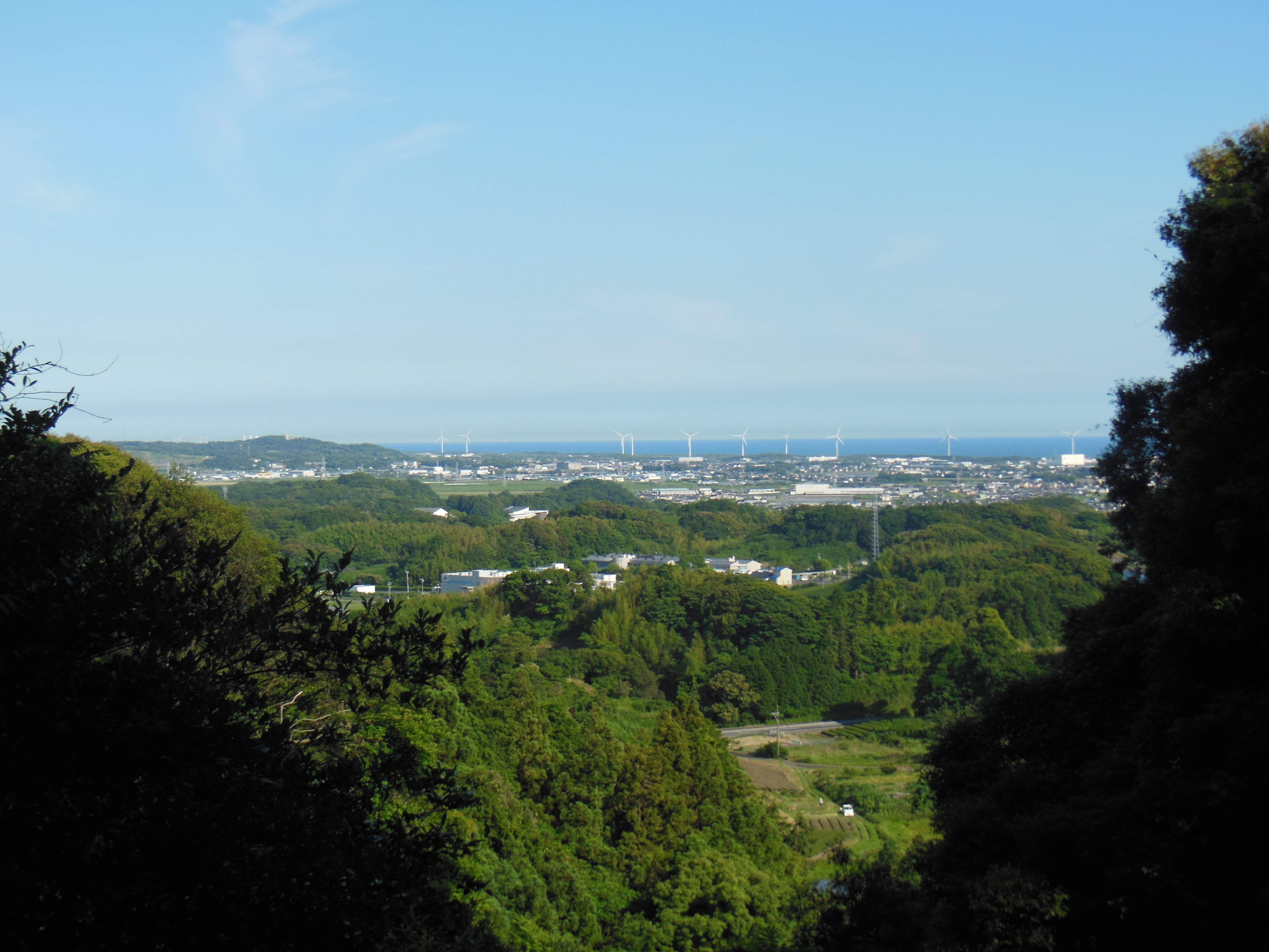 静岡県掛川市